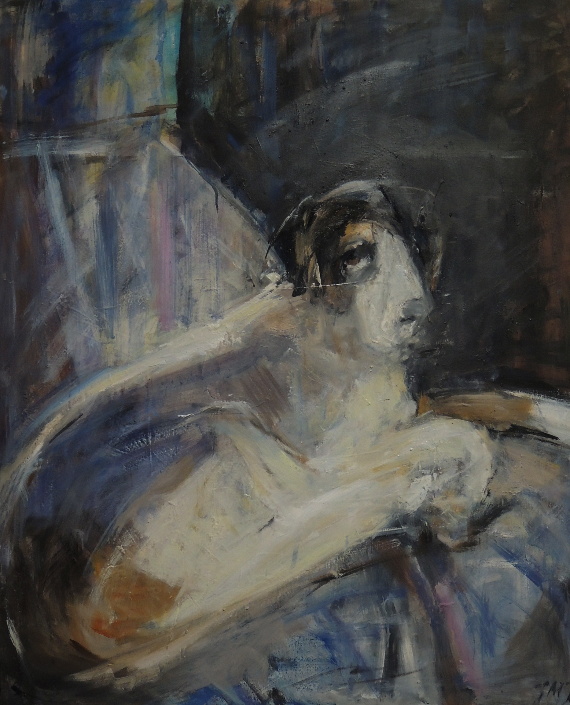 Obraz Maniusia Autor: Jadwiga Maria Jarosiewicz